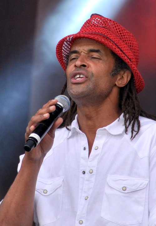 Yannick Noah au concert pour l'égalité de SOS-Racisme